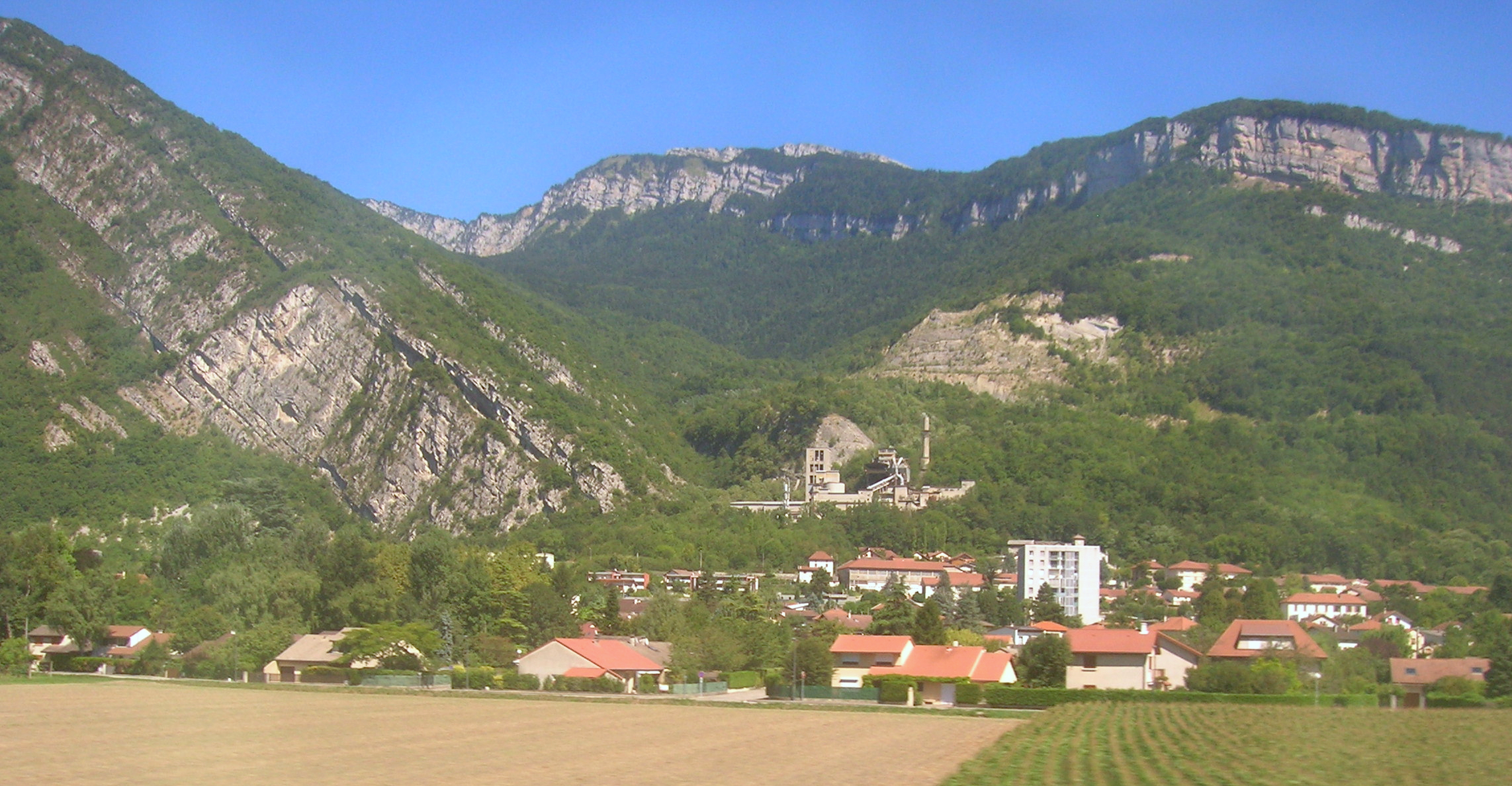 Le Chevalon de Voreppe, Isère, France. Panorama depuis le chemin de fer.